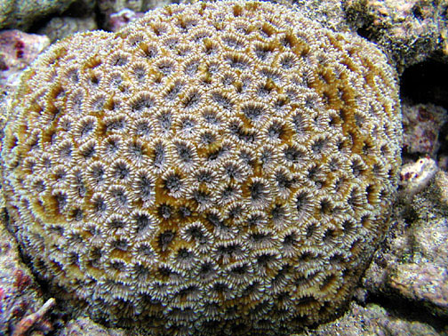 Dipsastraea matthaii (Favia matthaii), Samoa Americana NP